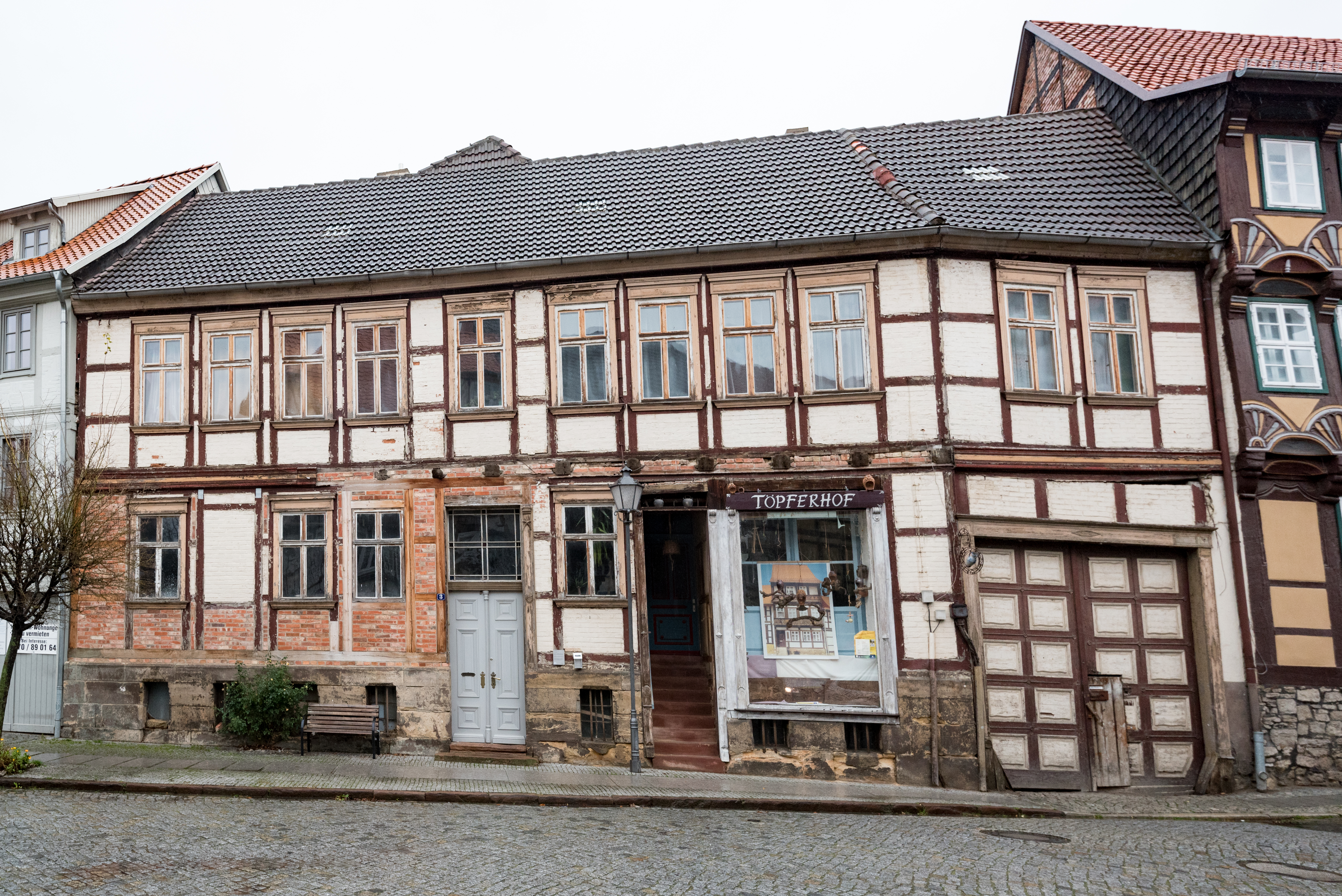 Osterwieck, Am Markt 3